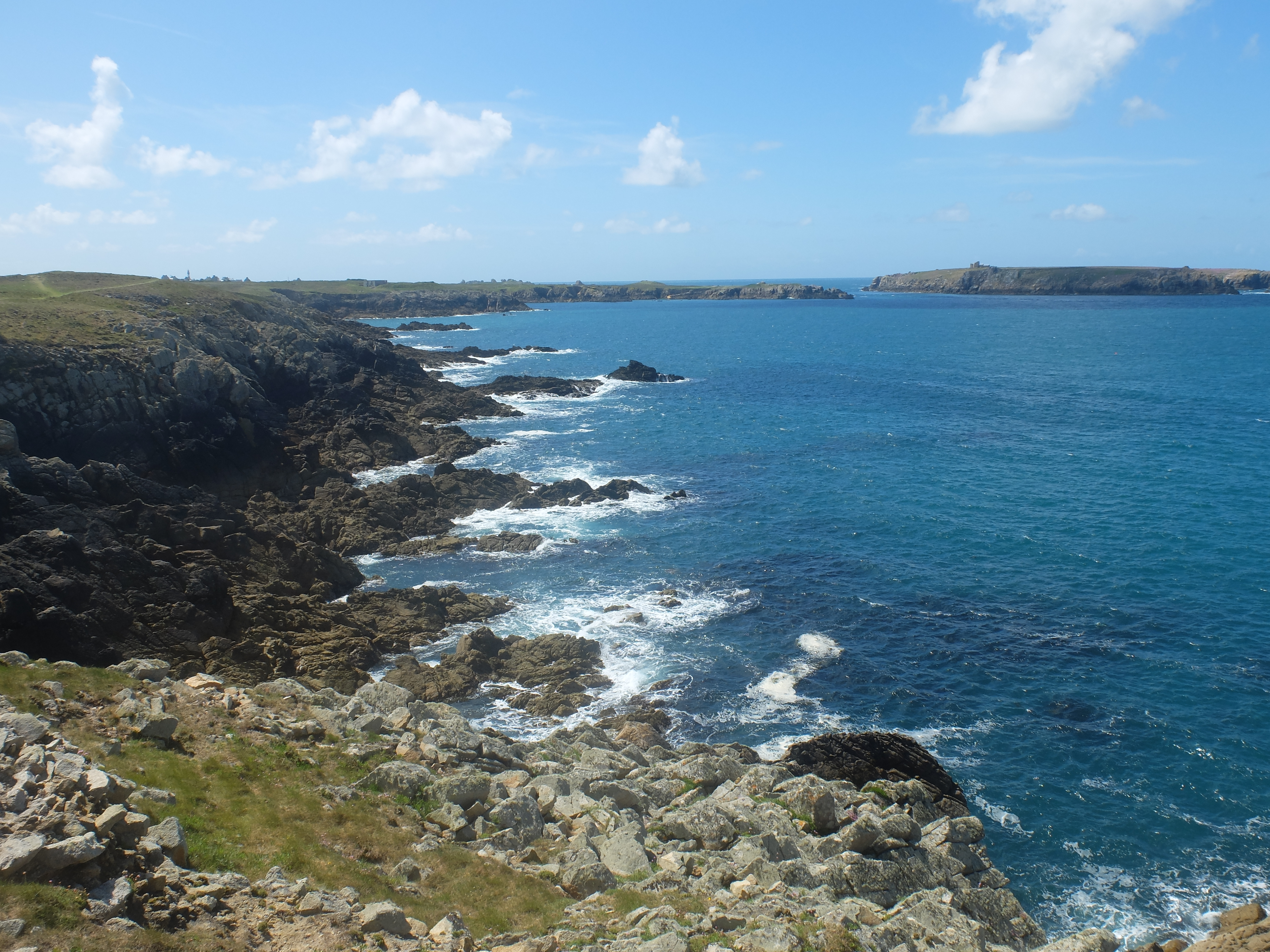 La baie de Calgrac'h à Ouessant et l'île Keller en arrière plan